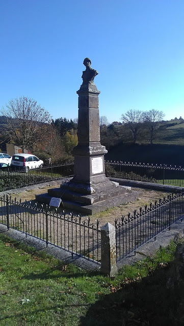 Monument en souvenir des morts des guerres de l'ancienne commune de Bournoncles